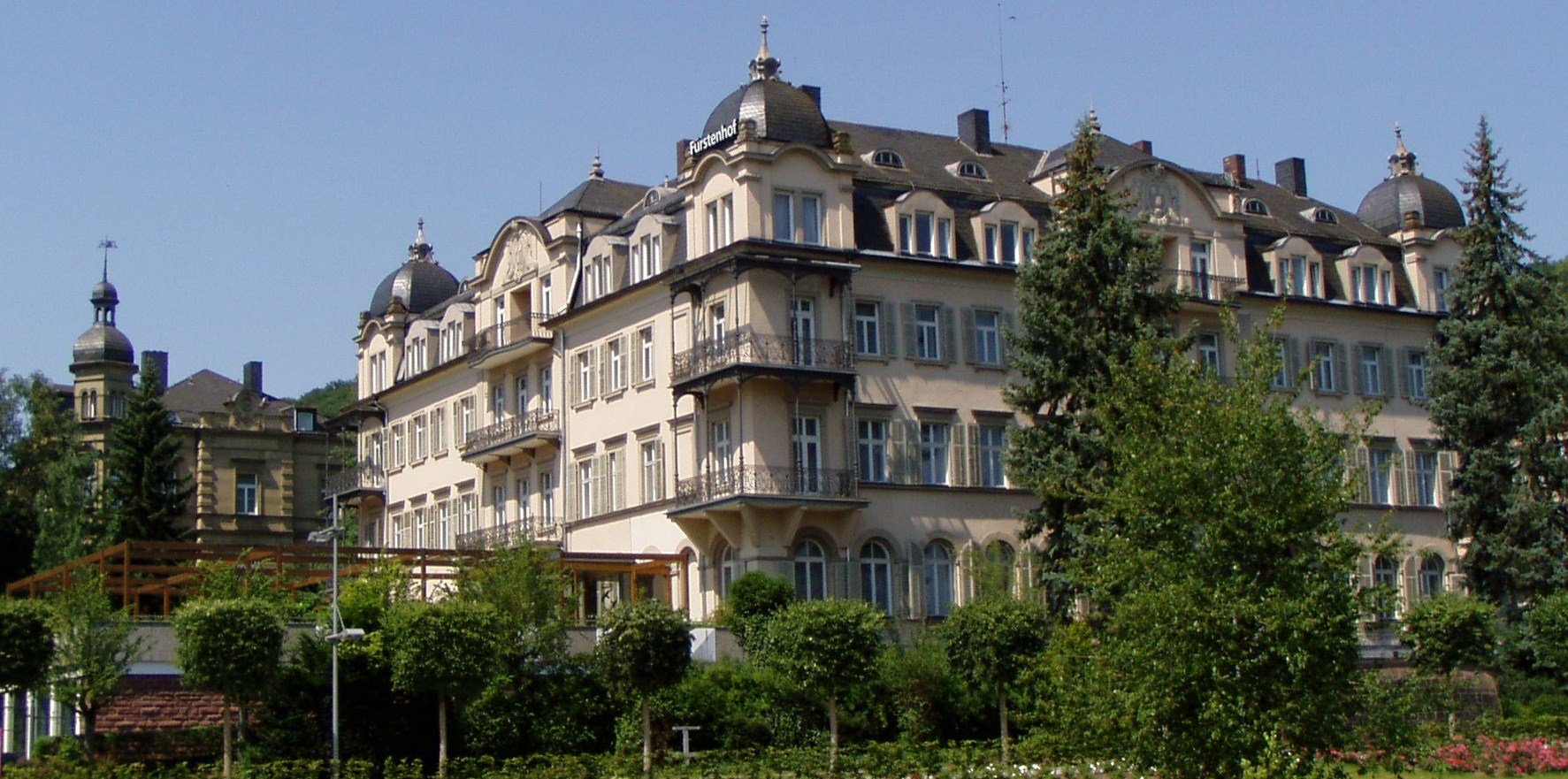 Sanatorium "Fürstenhof" in Bad Kissingen